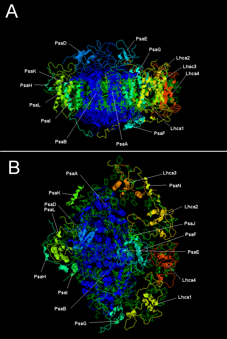 фотосистема один, её субъединицы и внешние светособирающие коплексы